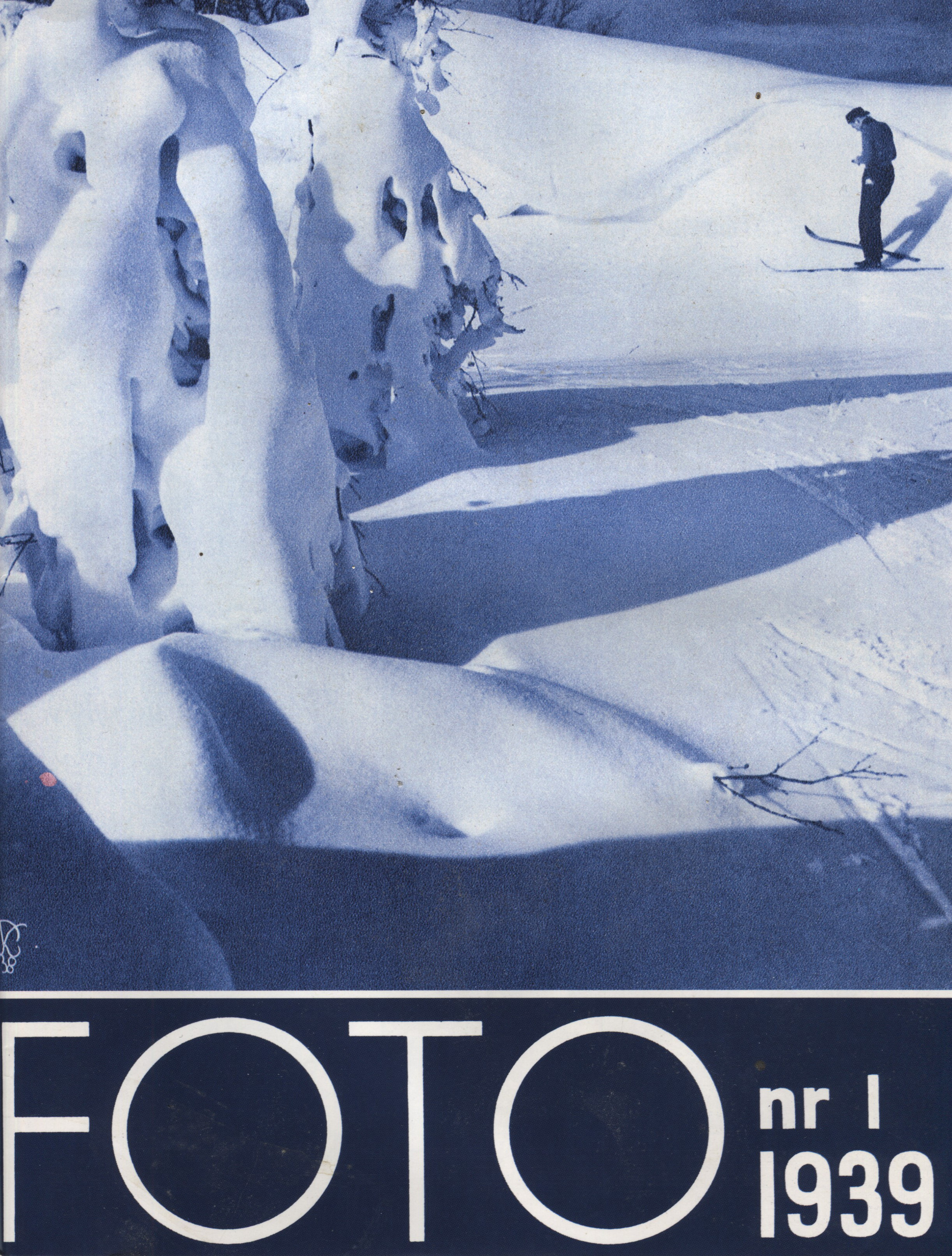 Första nummer av tidskriften FOTO